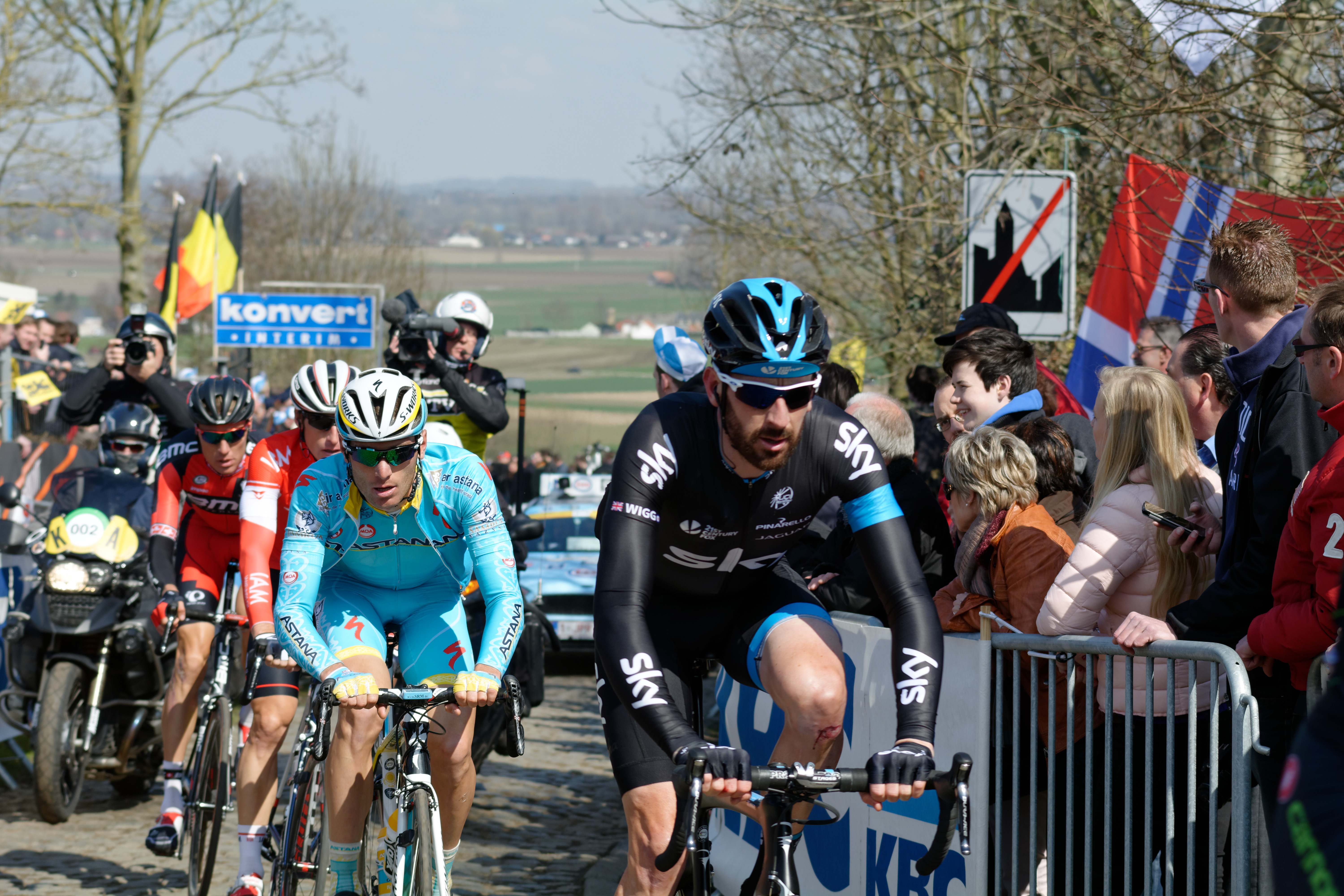 D71_6338_DxO